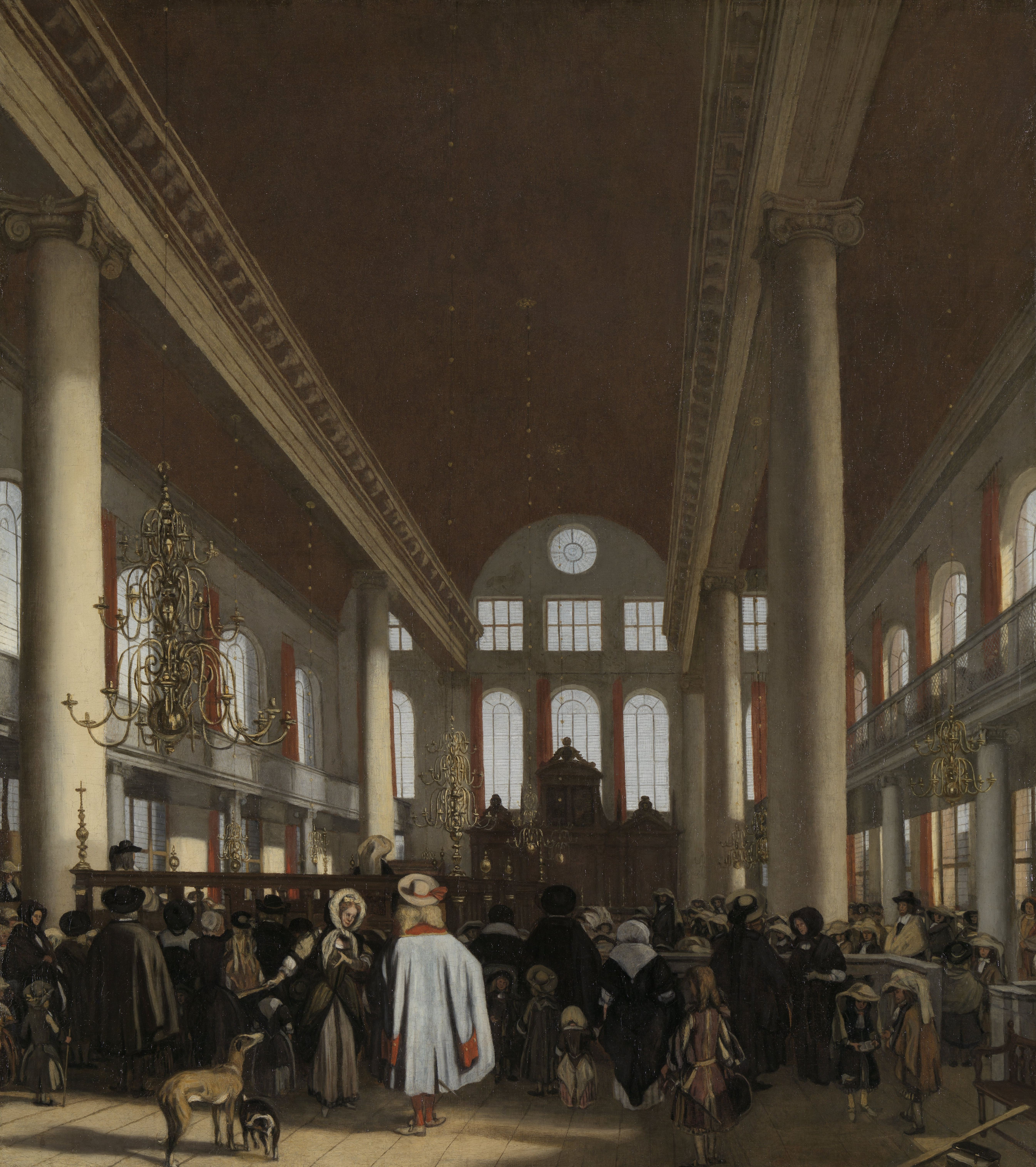 Interieur van de Portugese synagoge te Amsterdam tijdens een joodse dienst. Op de voorgrond een groep toeschouwers met kinderen en honden.